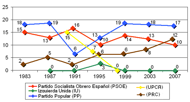 Grafico de las elecciones autonomicas en Cantabria